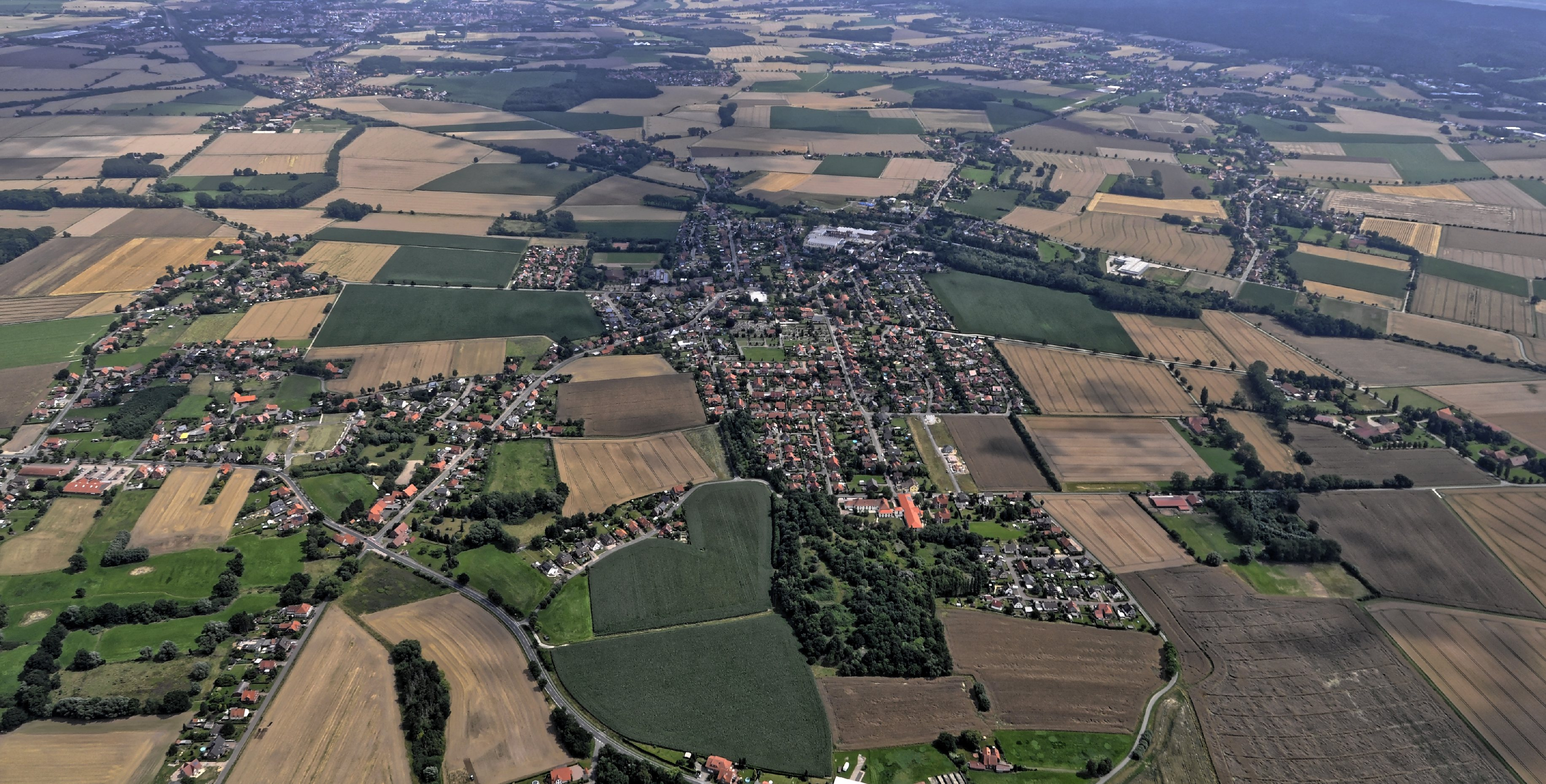 Bilder vom Flug Nordholz-Hammelburg 2015: Seggebruch & Helpsen.